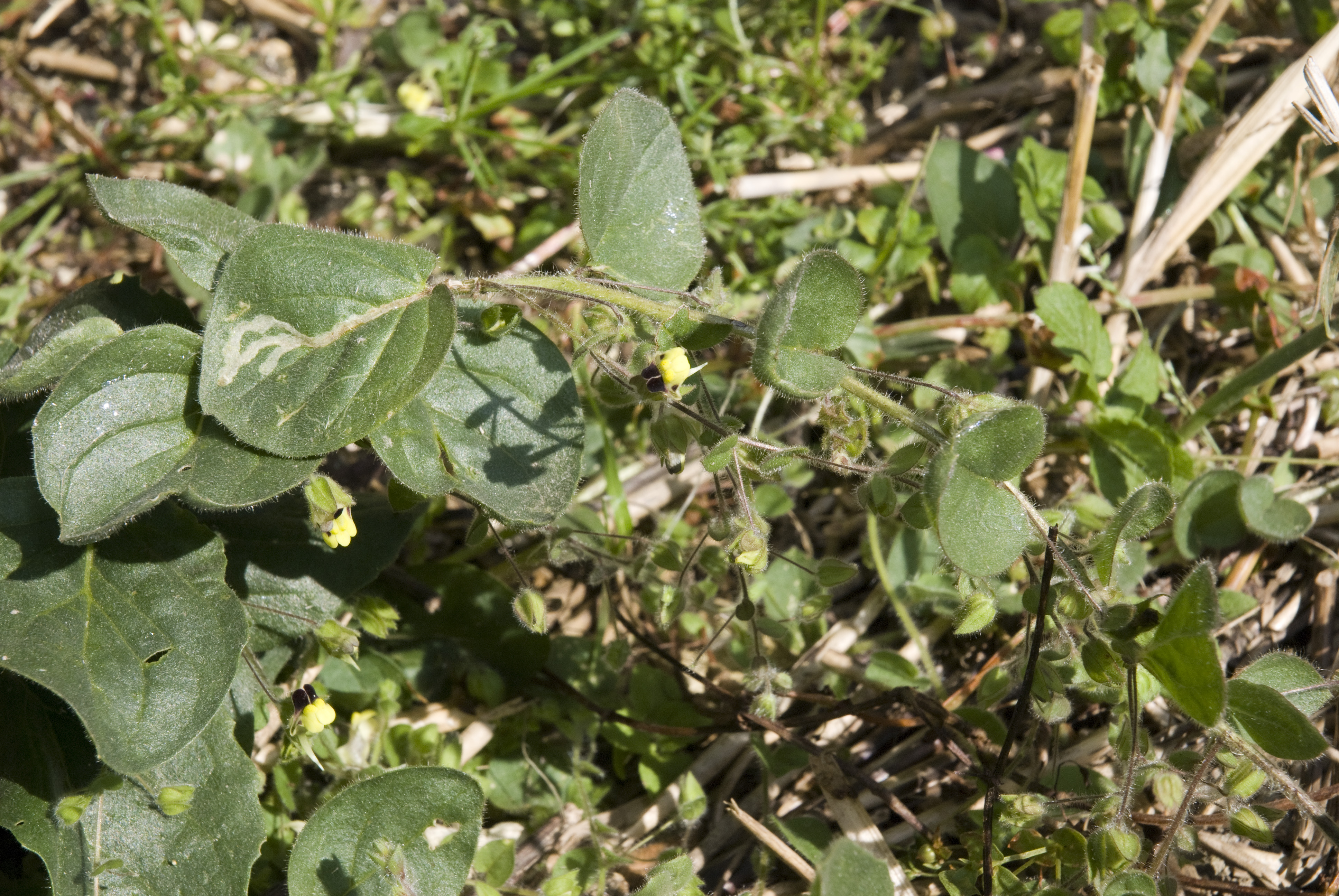 Kickxia spuria Vallée de Grâce à Amiens (Somme), France